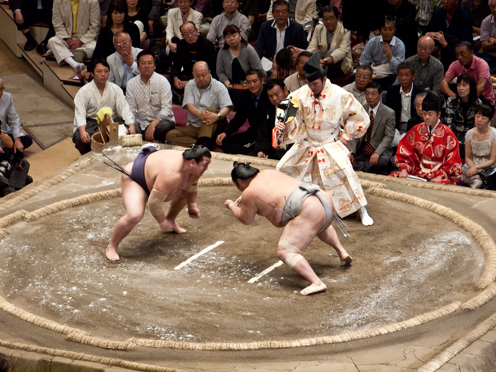 Sumo-Ringer in Tokyo